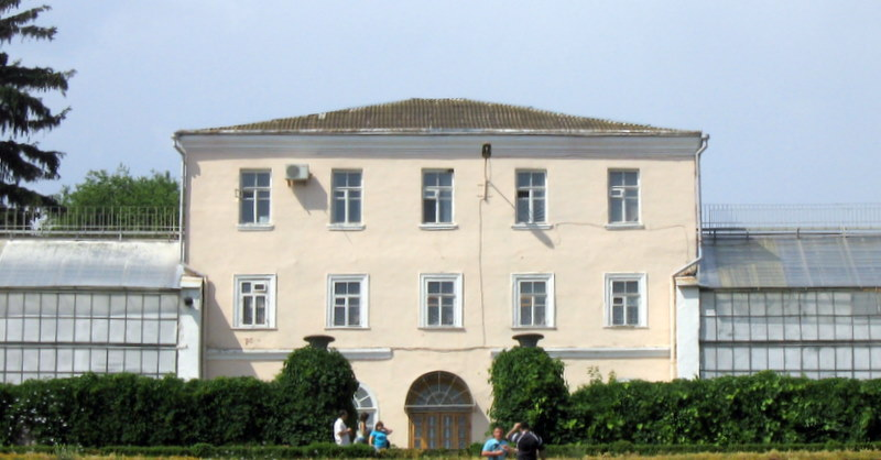 Оранжерея.